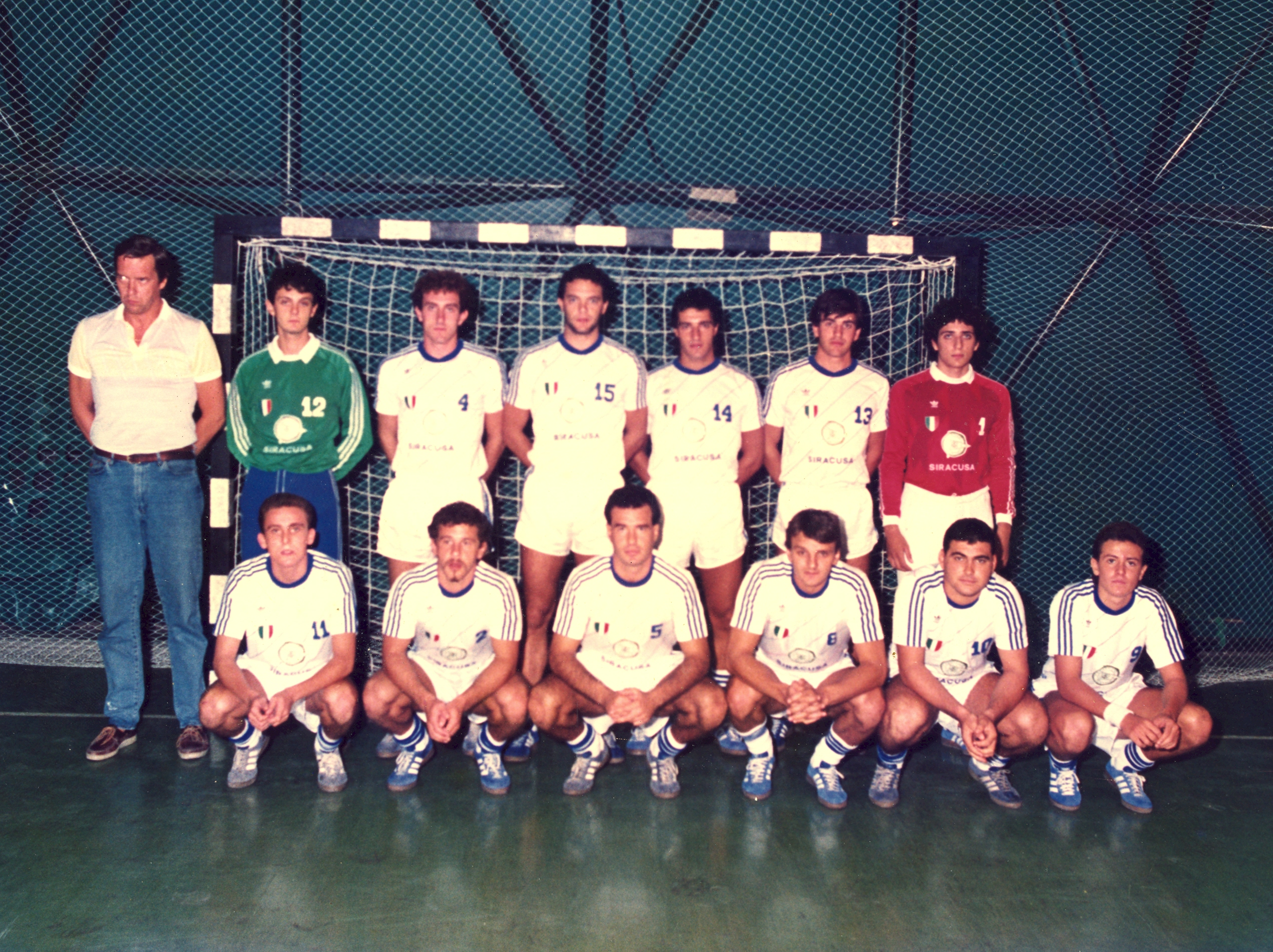 Ortigia 1986/87